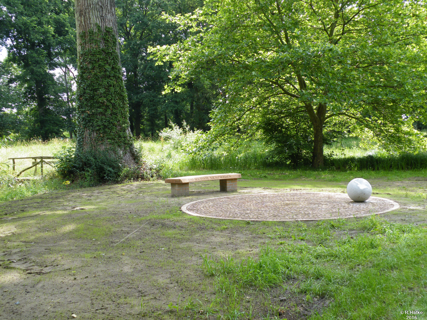 NaturPoesieGarten